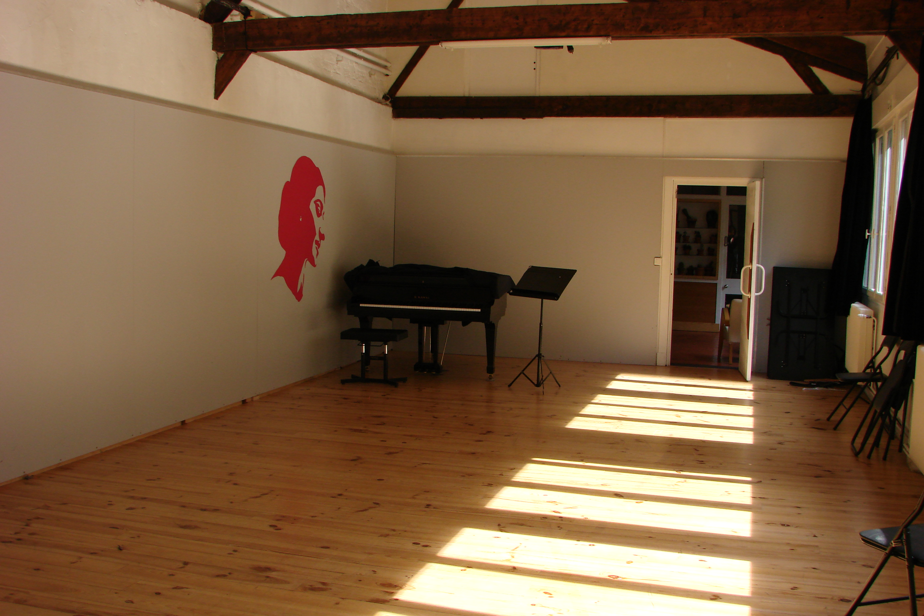 Studio de 70 m2, avec un piano